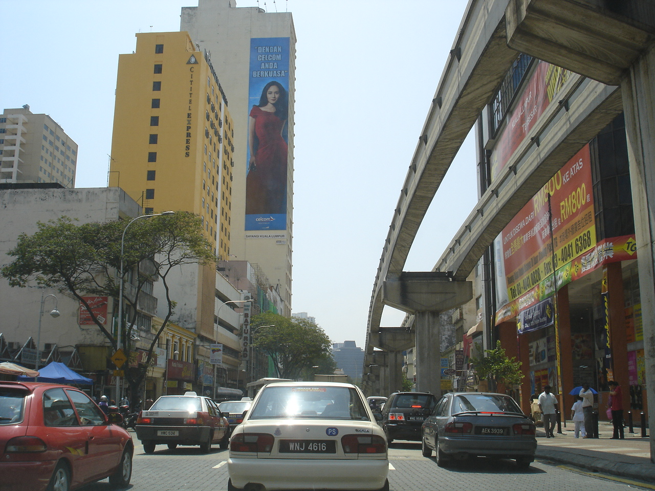 The shopping strip along Jalan Tuanku Abdul Rahman in Kuala Lumpur.